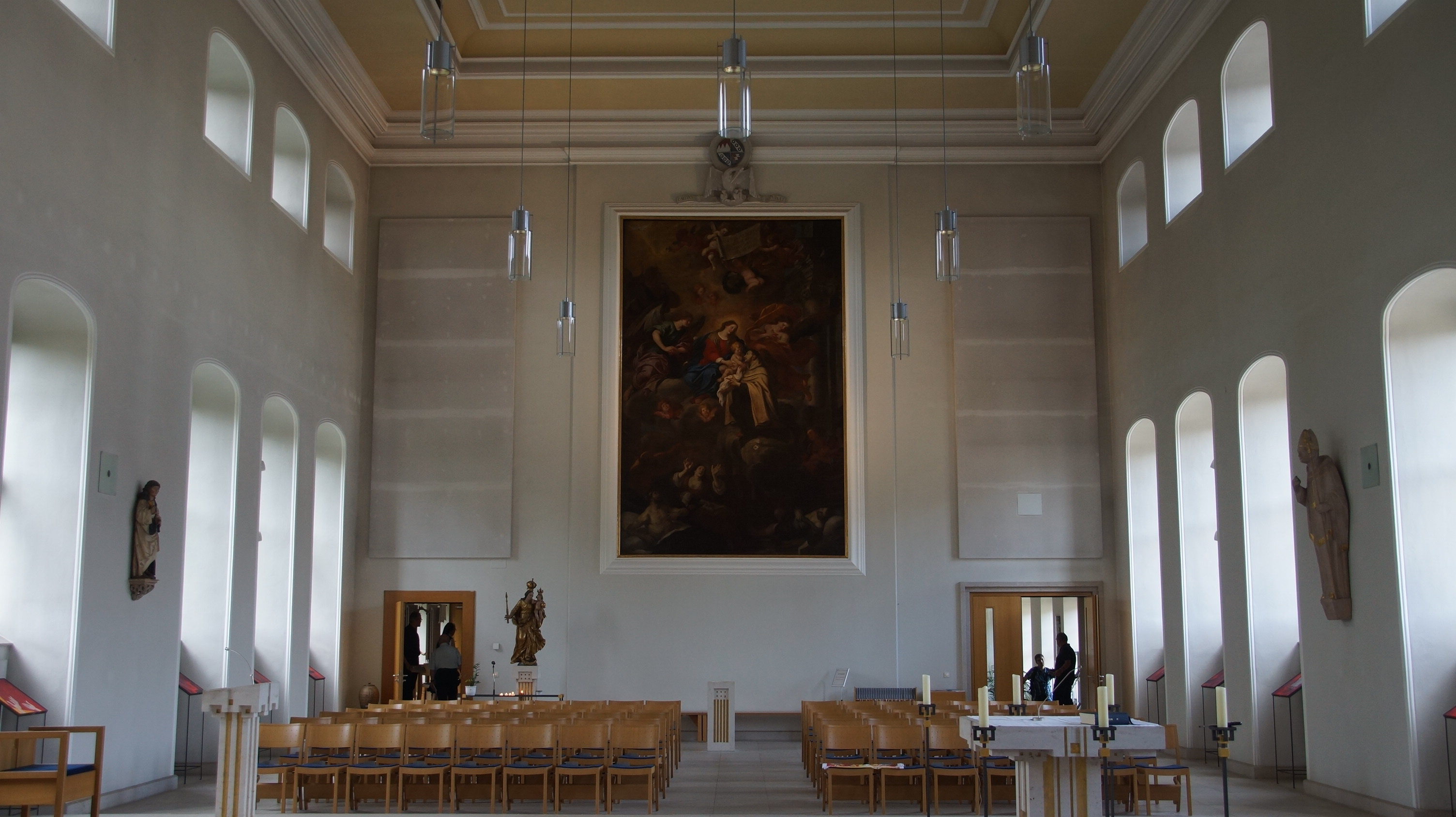 Aufgenommen während des zweiten Stammtischs von WP:Unterfranken in Würzburg